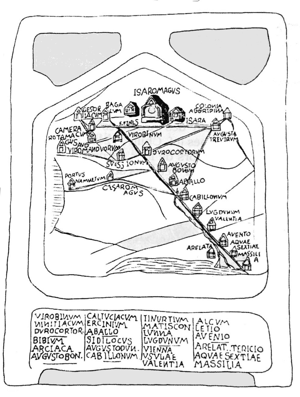 trouvé lors de fouilles.